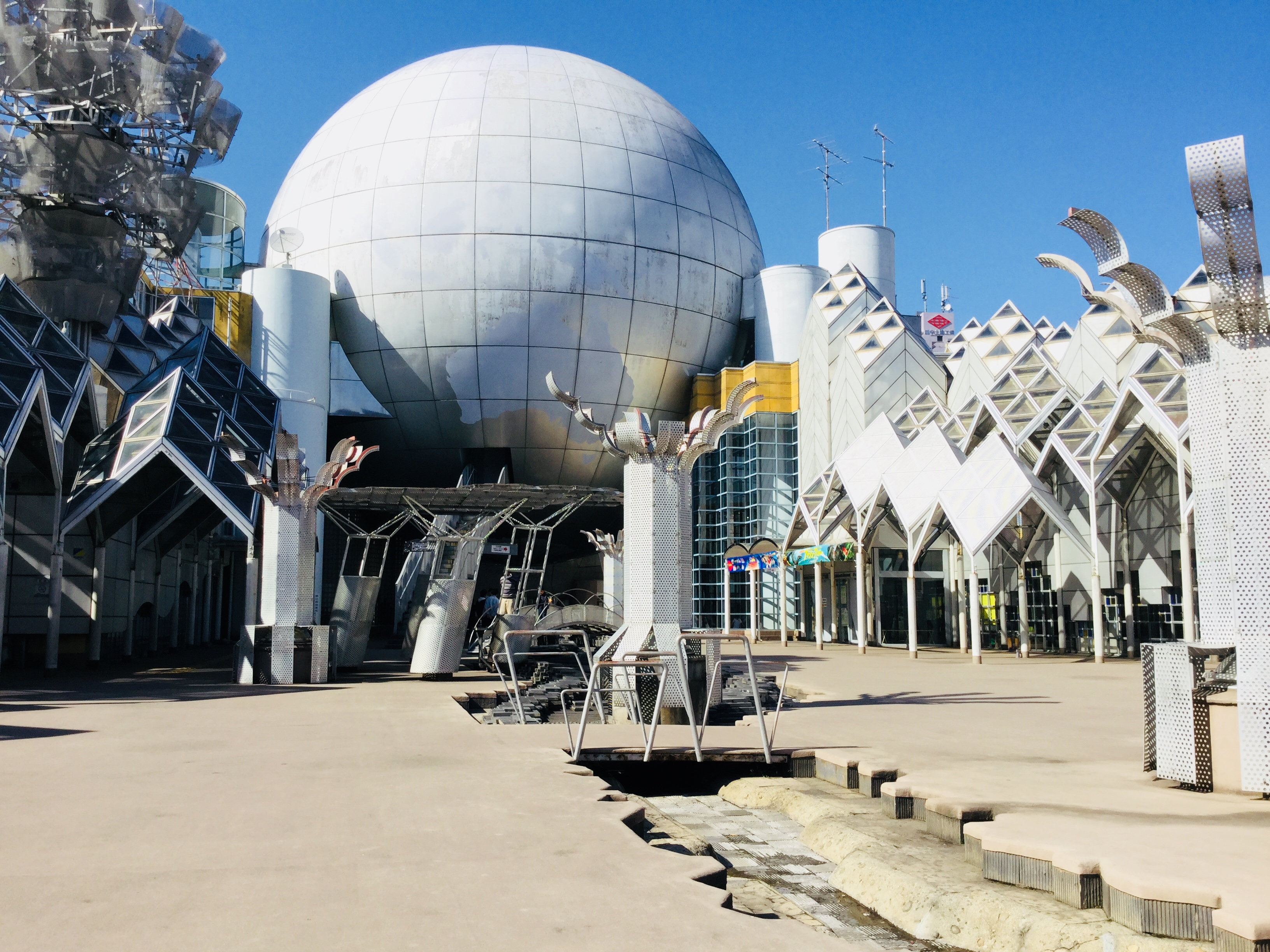 湘南台文化センターの地球儀